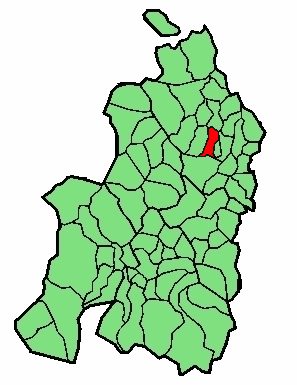 aipaturiko udalerriaren kokapena Nafarroa Beherean